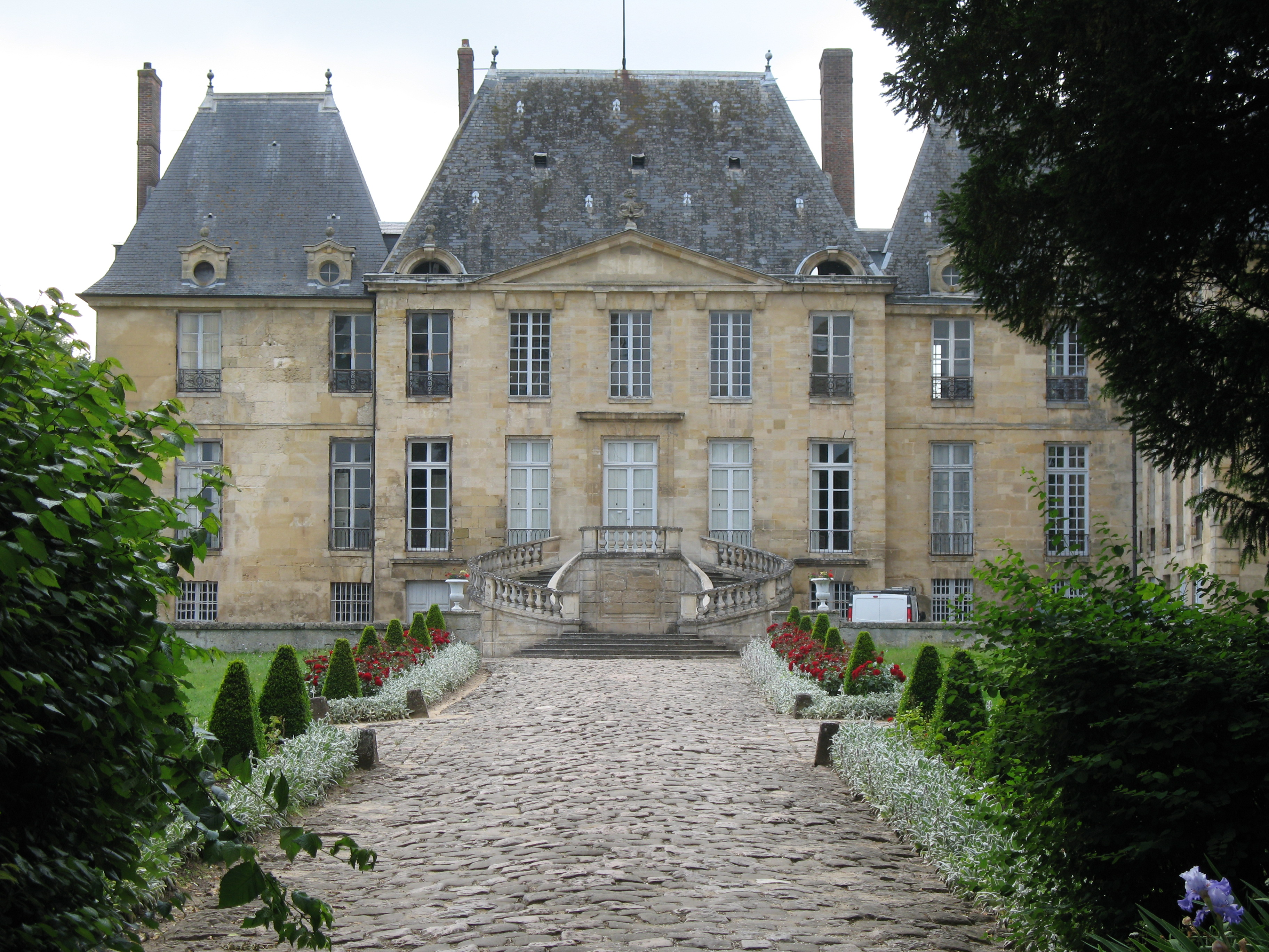 Château de Montgeroult - Montgeroult - Val d'Oise